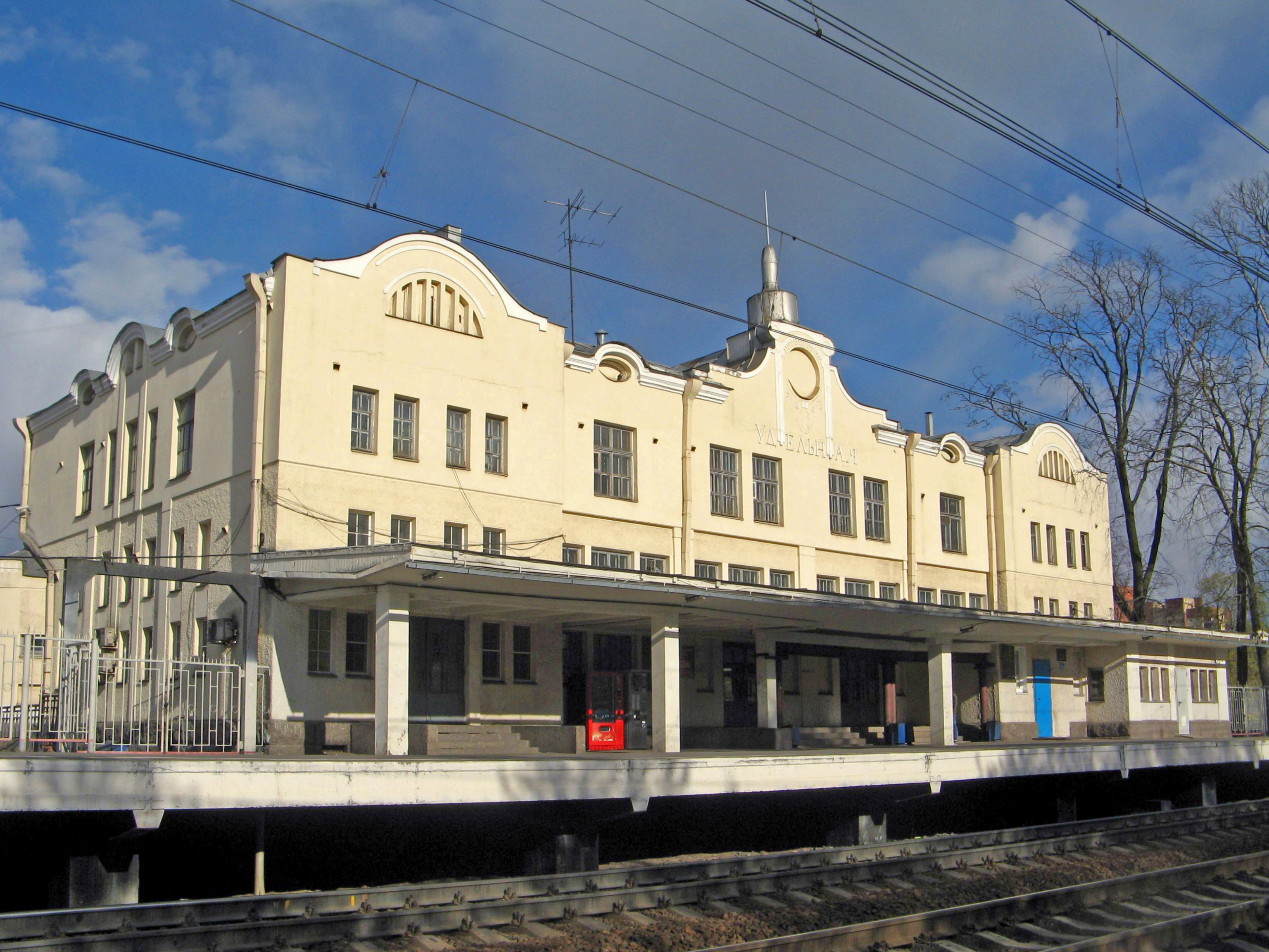 Железнодорожная станция Удельная. Комплекс сооружений Финляндской железной дороги: Финляндская линия Октябрьской ж. д., ж. д. ст. Удельная, Выборгский район, Санкт-Петербург